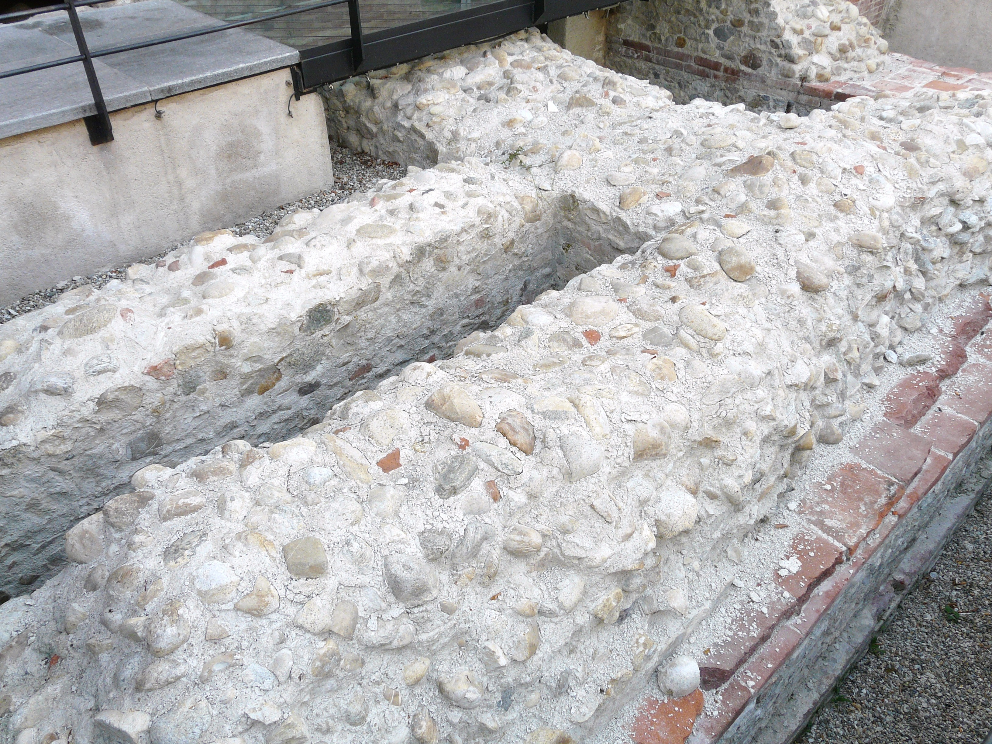 Ritrovamenti di epoca romana presso il Palazzo Marro, Alba, Piemonte, Italia